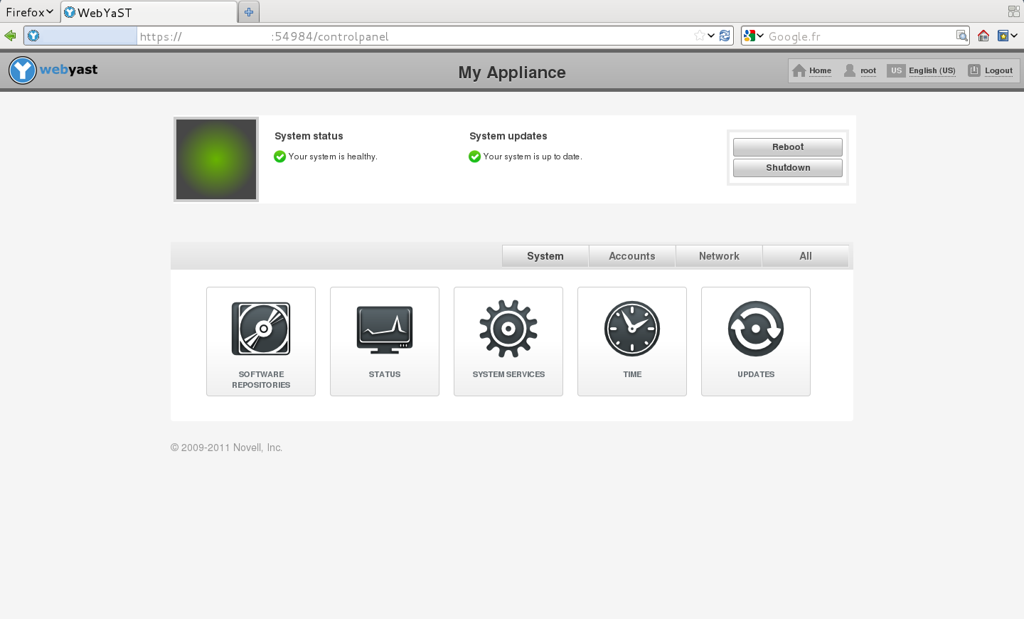 Webyast in action